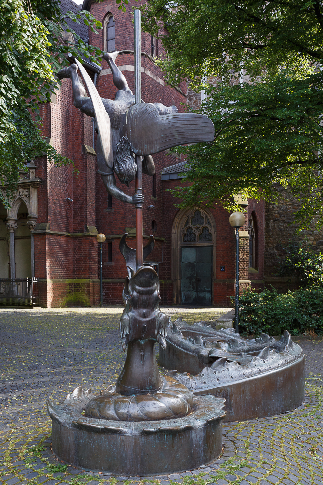 Plastik des Erzengels Michael, welcher den Drachen erschlägt.